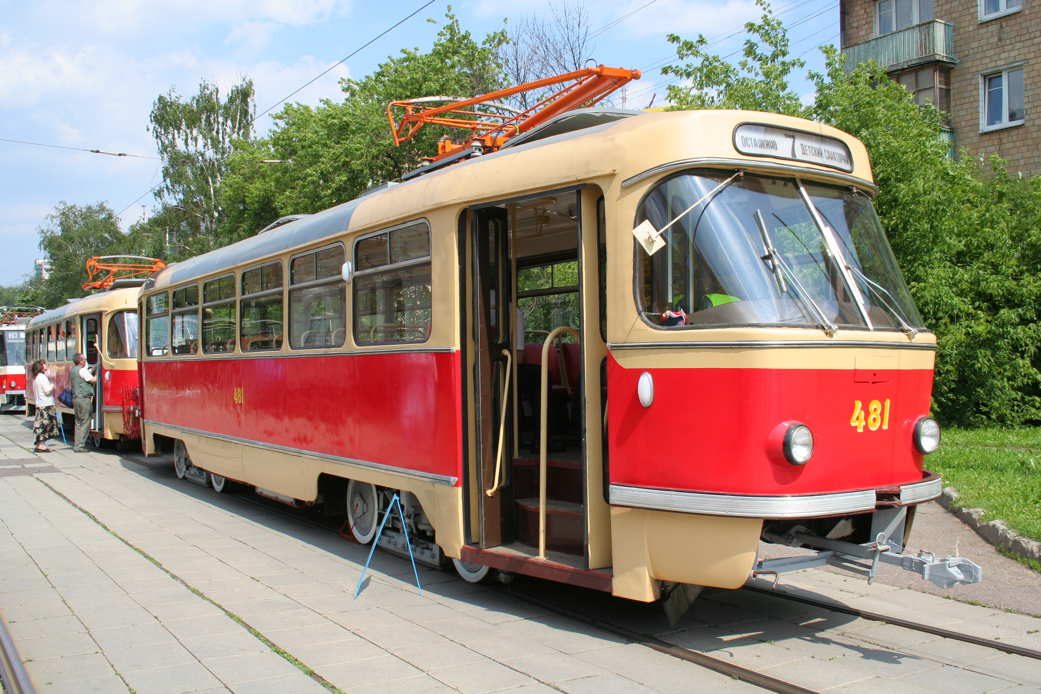 Ретро-трамвай Мосгортранса Татра Т-3 на показе около Депо им. Баумана 12 июня 2010 года.